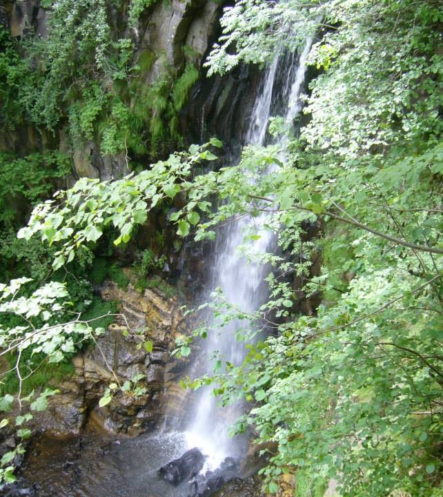 L'accès à la cascade de Montréal à Brezons est aménagé depuis 2013